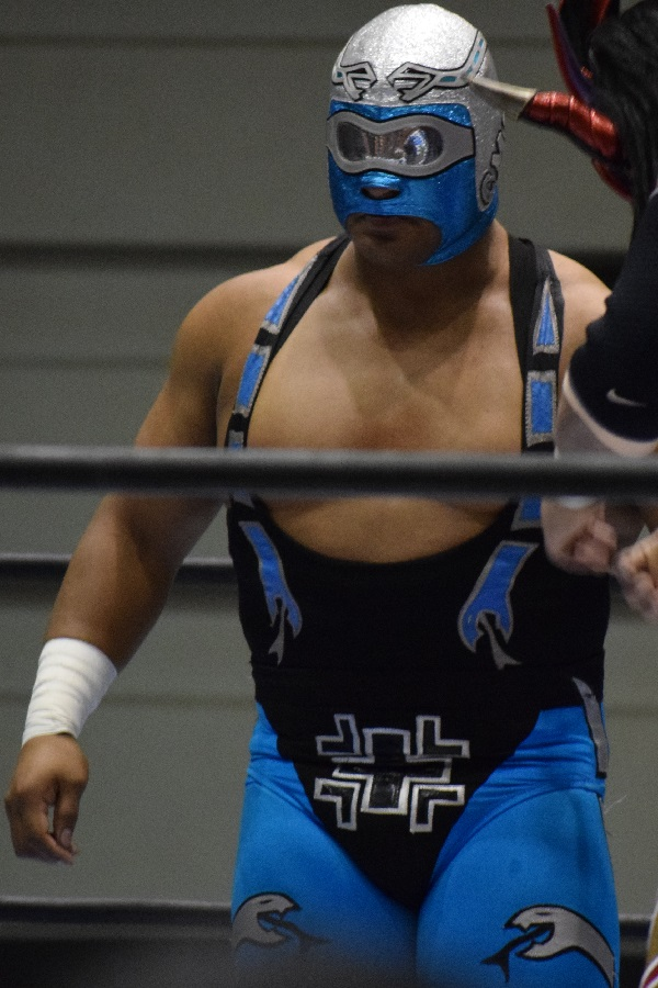 2017年1月13日 大阪府立体育会館・第二競技場「CMLL FANTASTICA MANIA 2017」 ストゥーカ・ジュニア